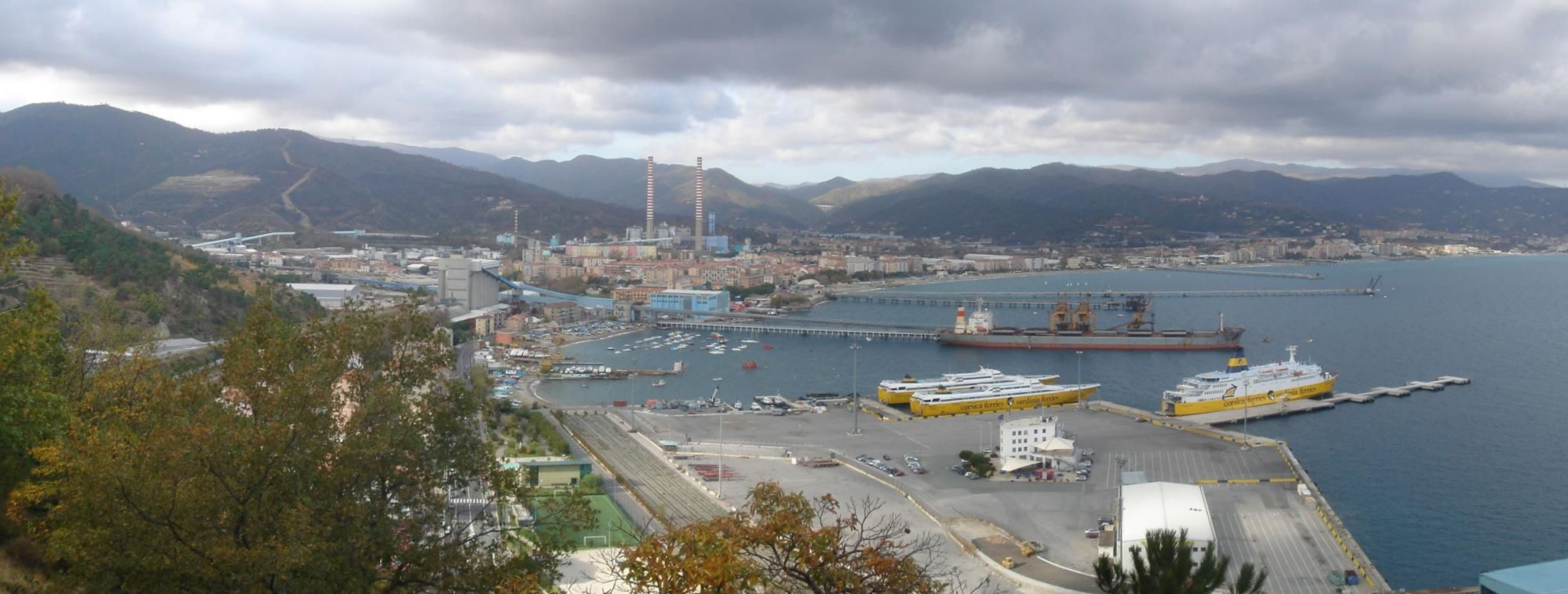 Vado Ligure (SV): view from Forte San Giacomo